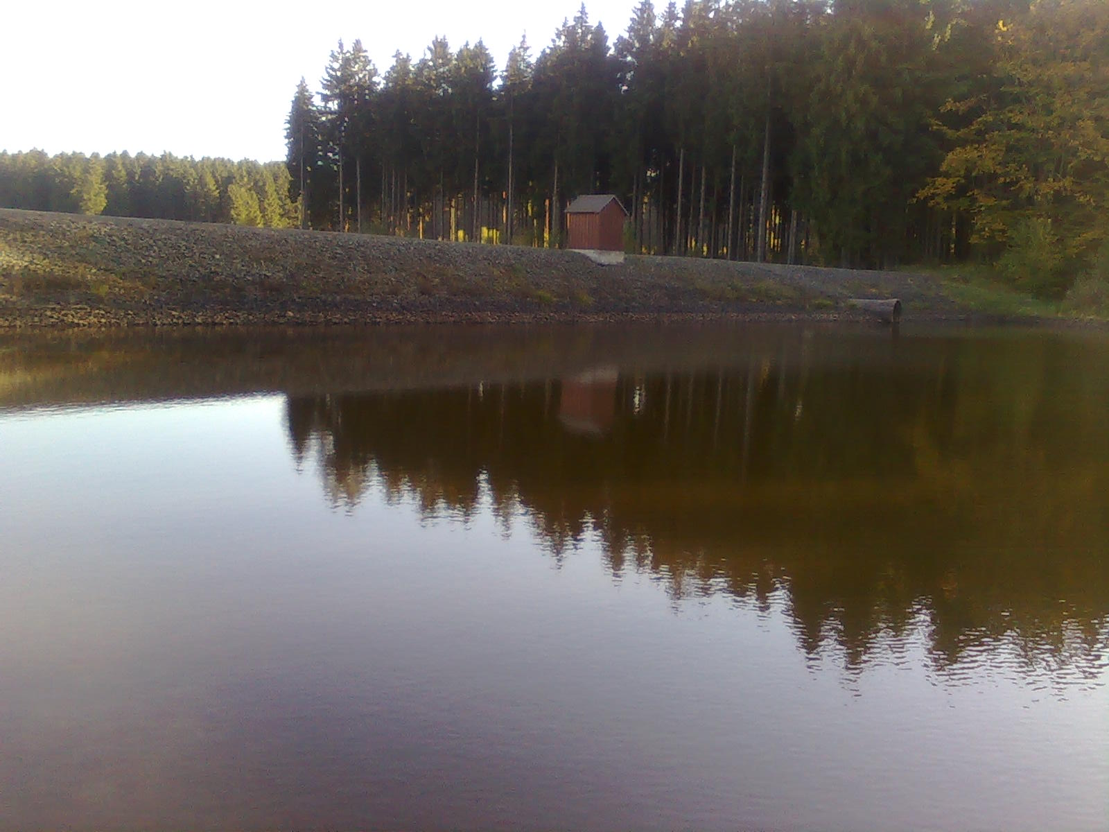 Blick vom Stausee auf den sanierten Staudamm, in Dammitte befindet sich das Striegelhäuschen